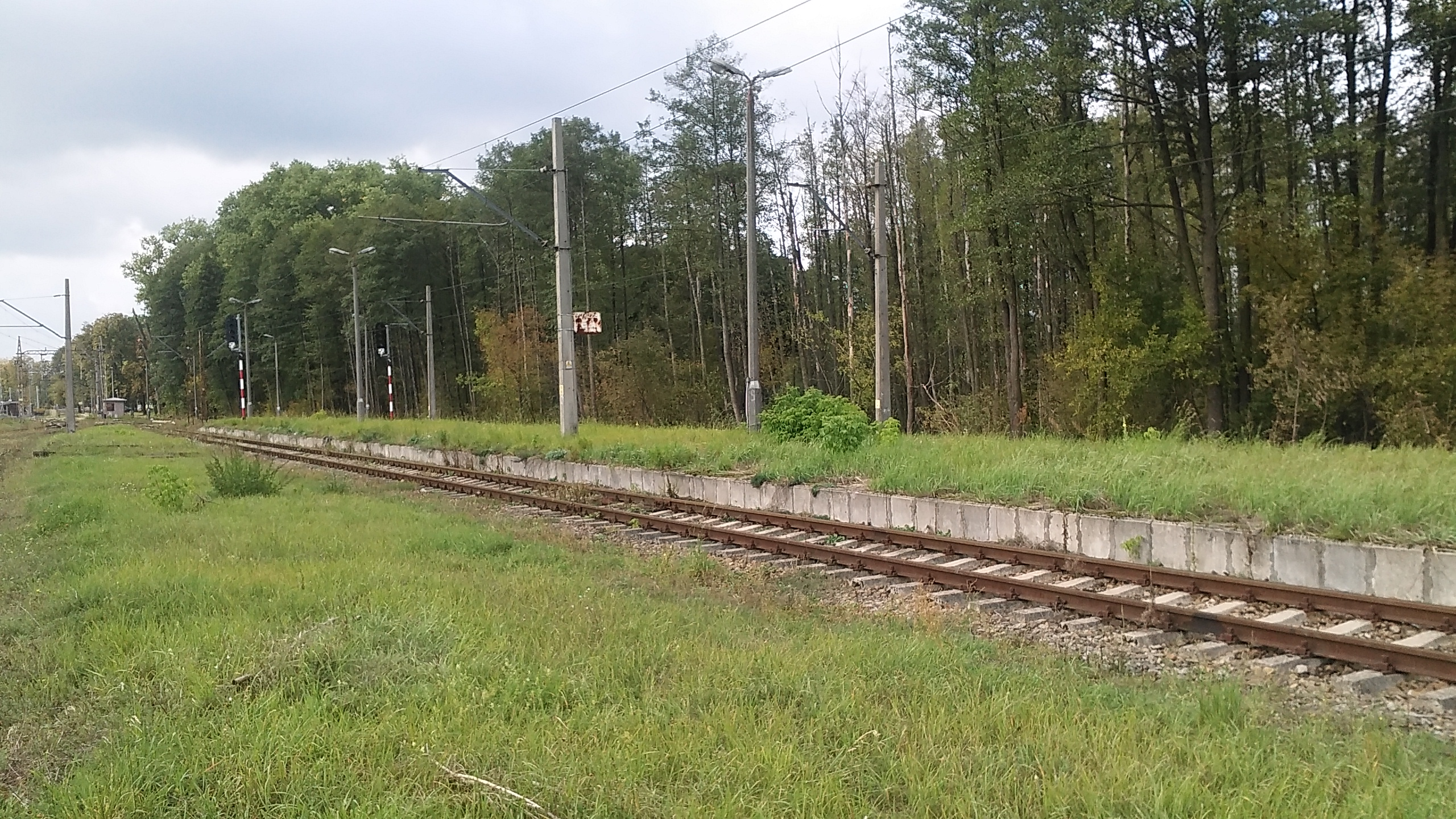 stacja kolejowa Małkinia - peron 3, nieużywany od 1993 roku, wcześniej służył do obsługi połączenia Ostrołęka - Małkinia - Siedlce